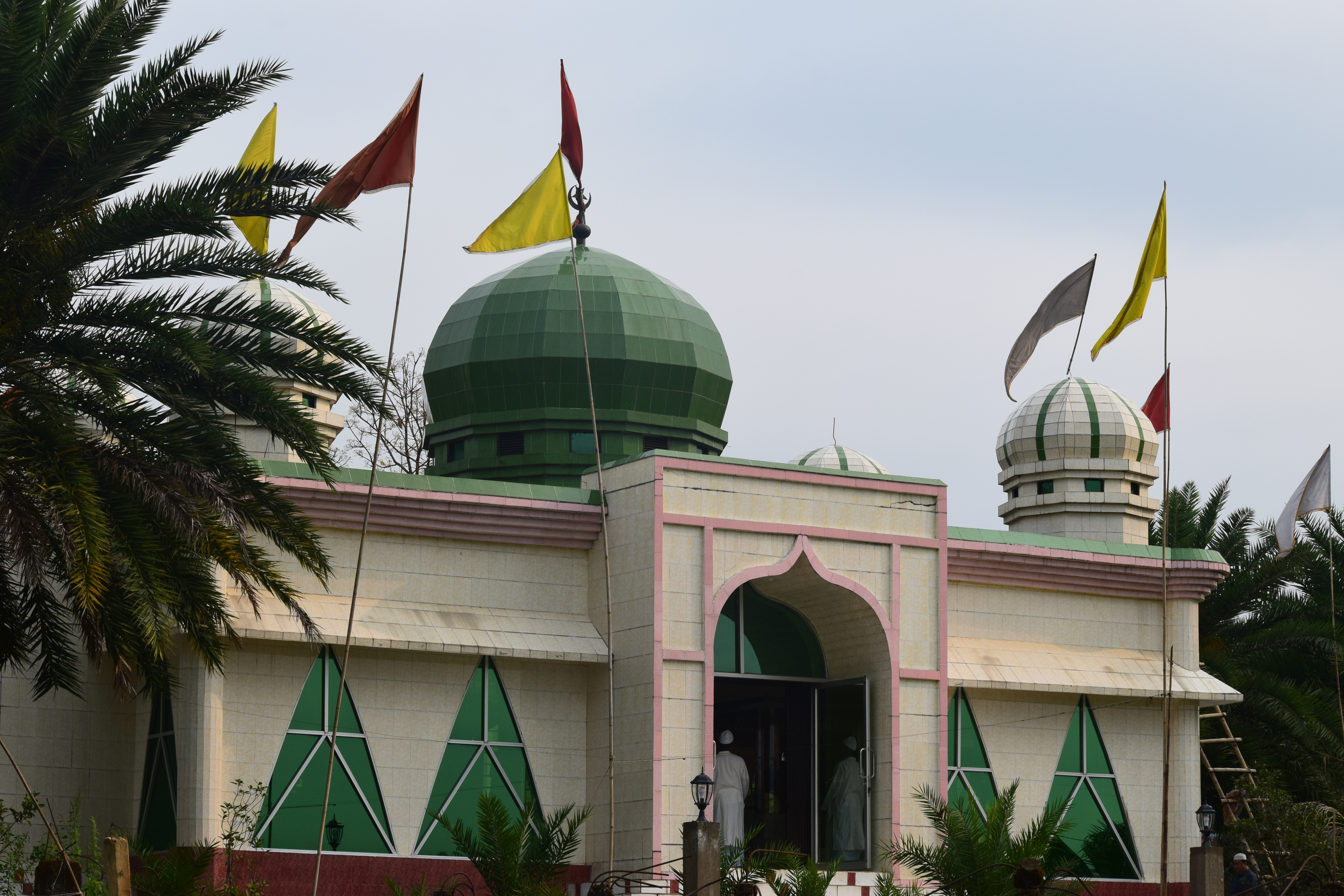 শাহপরান দরগাহ